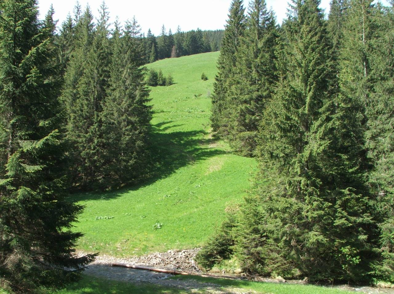 Polana Jaworzynka Lejowa